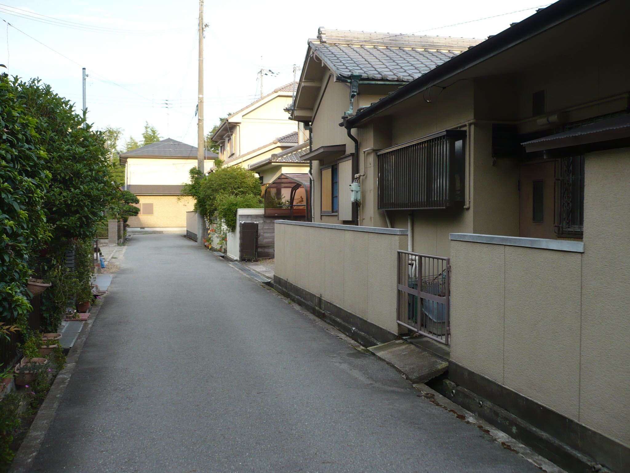 新城跡地